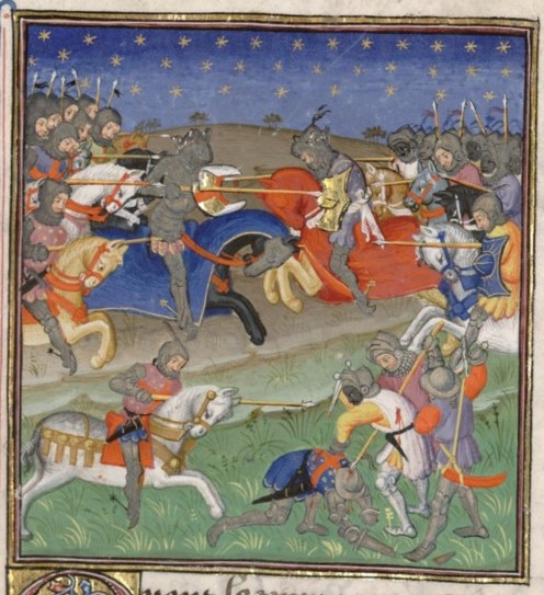 Bataille entre Alphonse XI et Muhammad IV (1330)